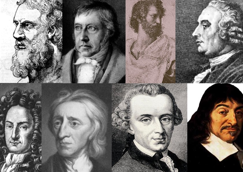 filsuf